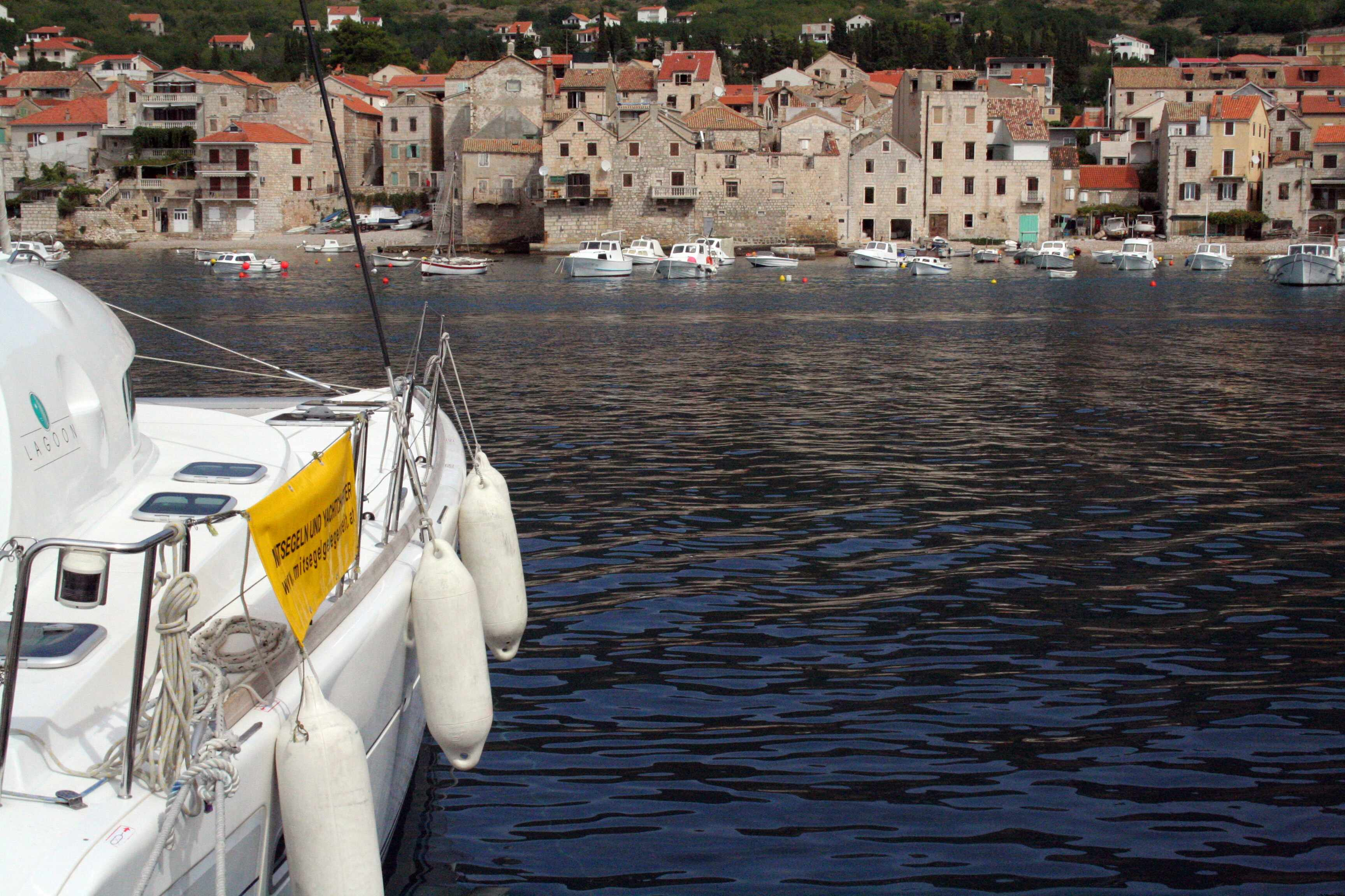 Komiza, Hafenansicht